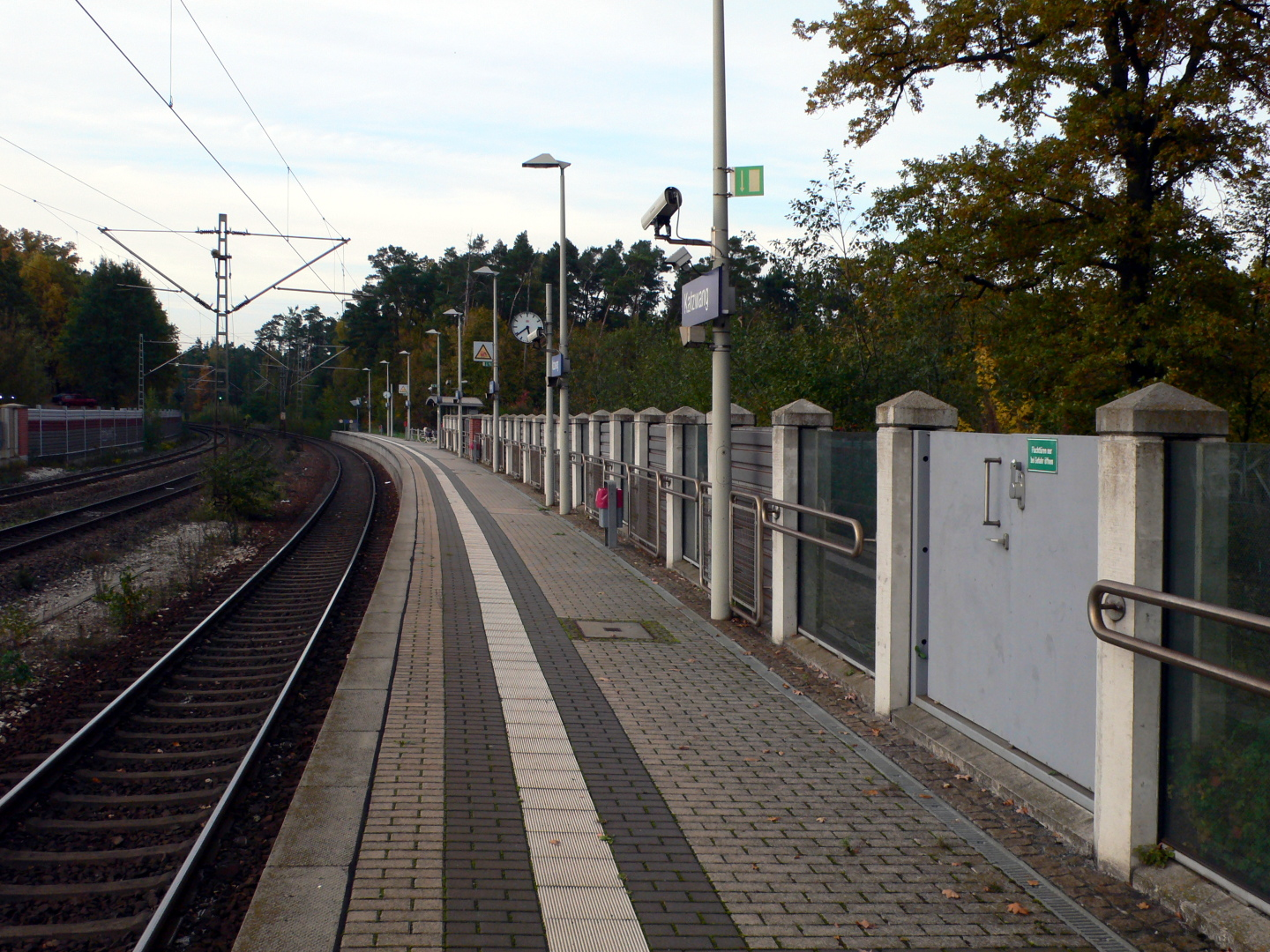 Haltepunkt Katzwang, Blick von Süden auf den Bahnsteig